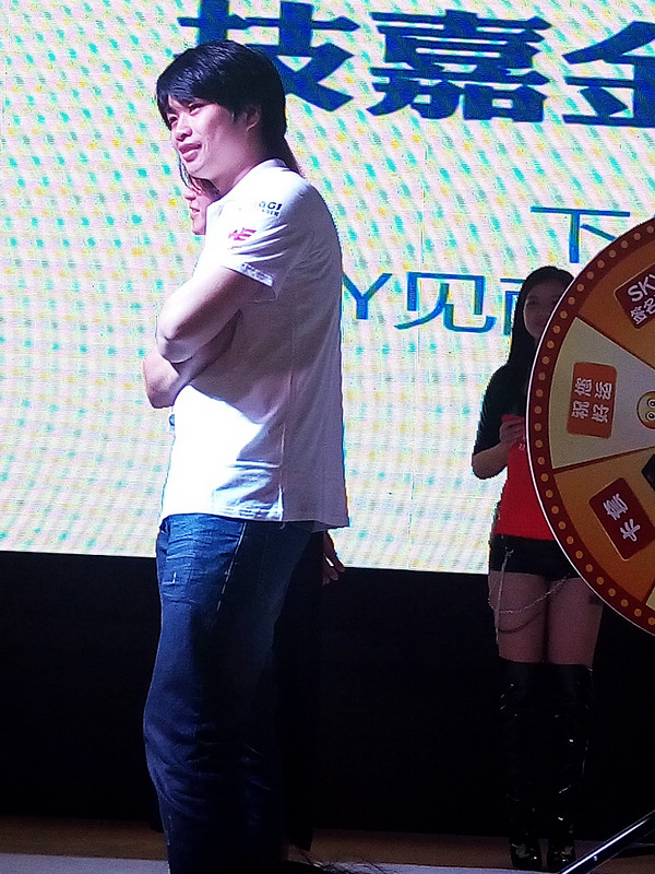 SKY在2014年的ChinaJoy